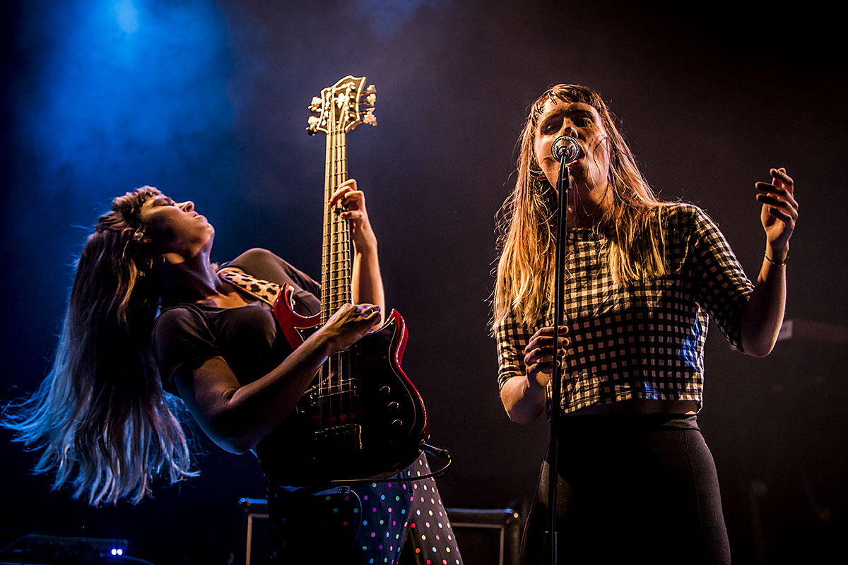 Signe SigneSigne og Selina Gin fra Nelson Can